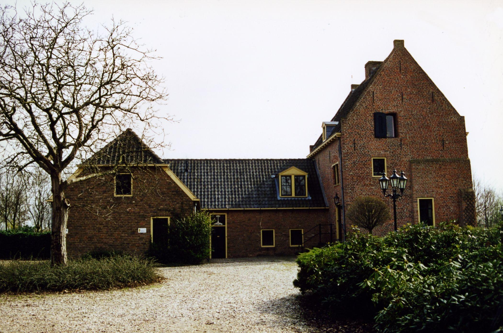 Havezate De Wesenthorst te Ulft.